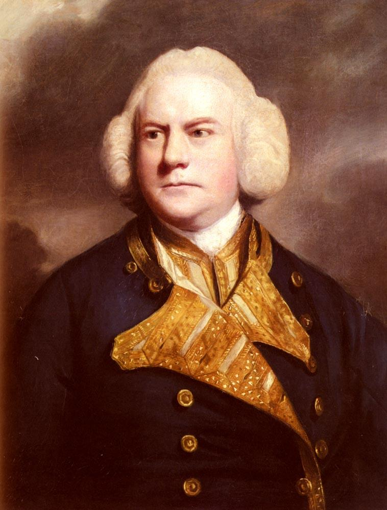 Portrait de l'amiral Thomas Cotes (1712-1767) par Joshua Reynolds